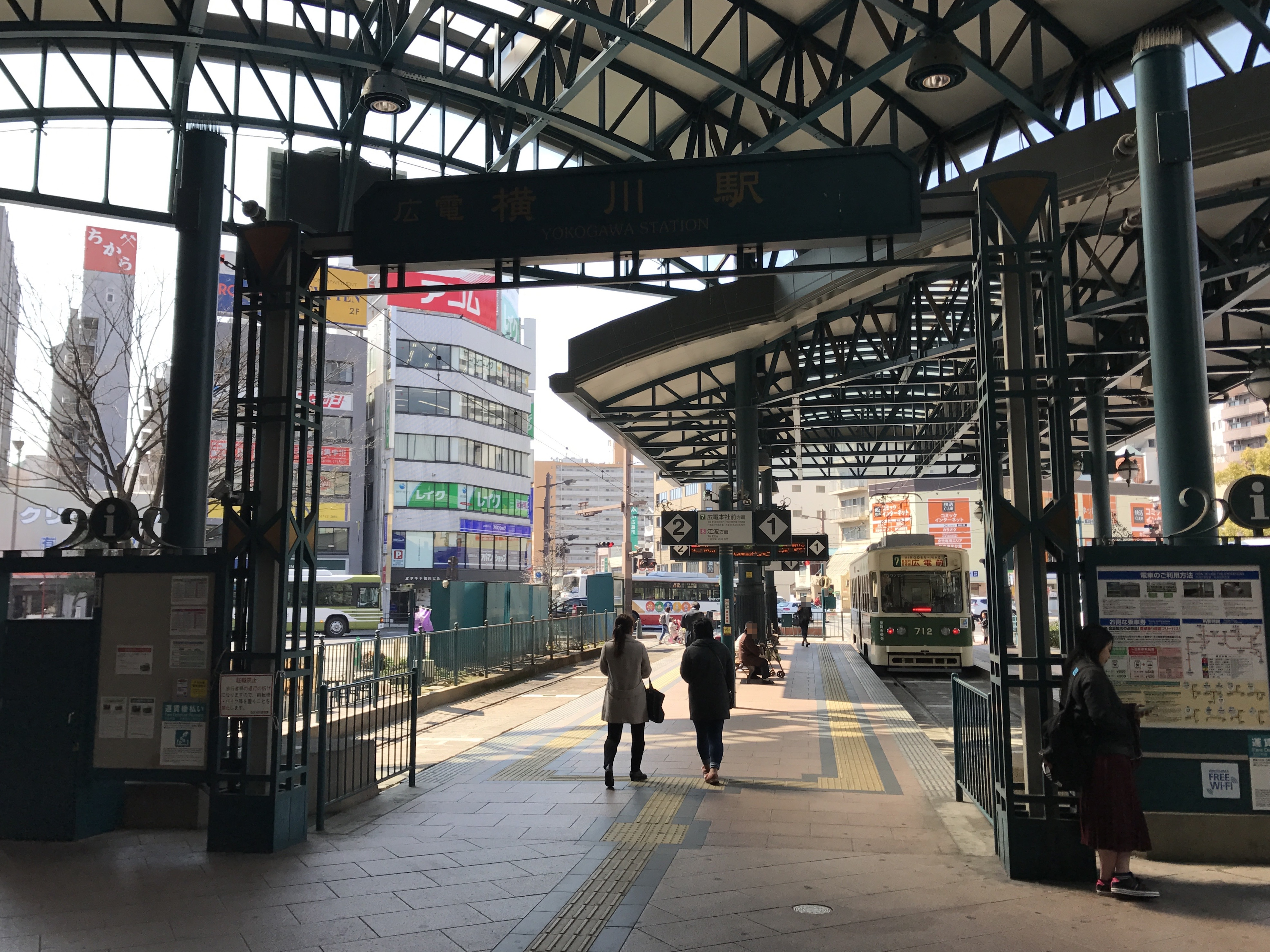 横川駅停留場